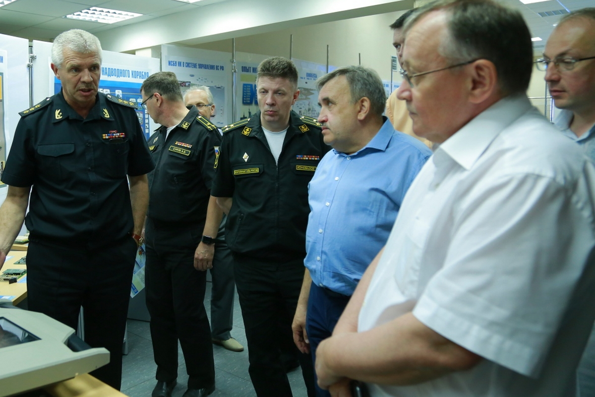 Заместитель Главкома ВМФ России адмирал Александр Витко во время посежения Федерального научно-производственного центра акционерное общество «Научно-производственное объединение «Марс»